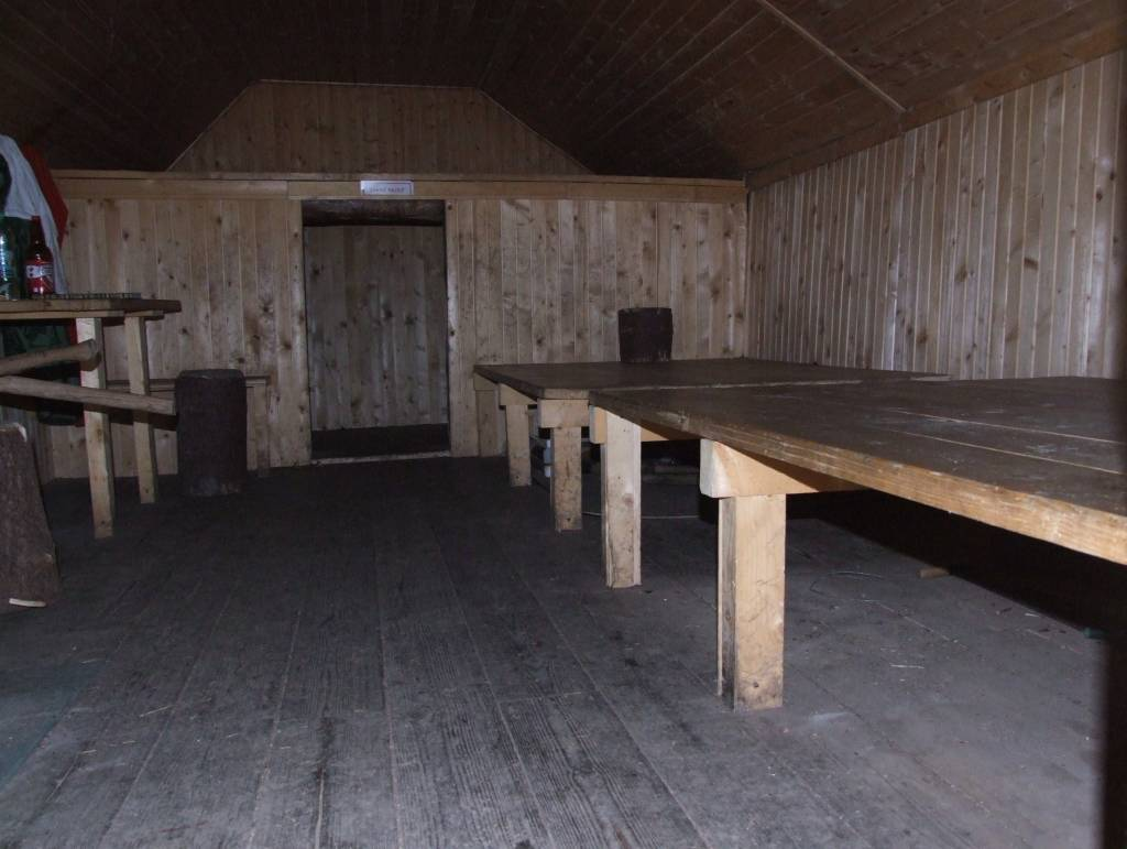 Domek na Polanie pod Pustem (Dolina Jamnicka w Tatrach)